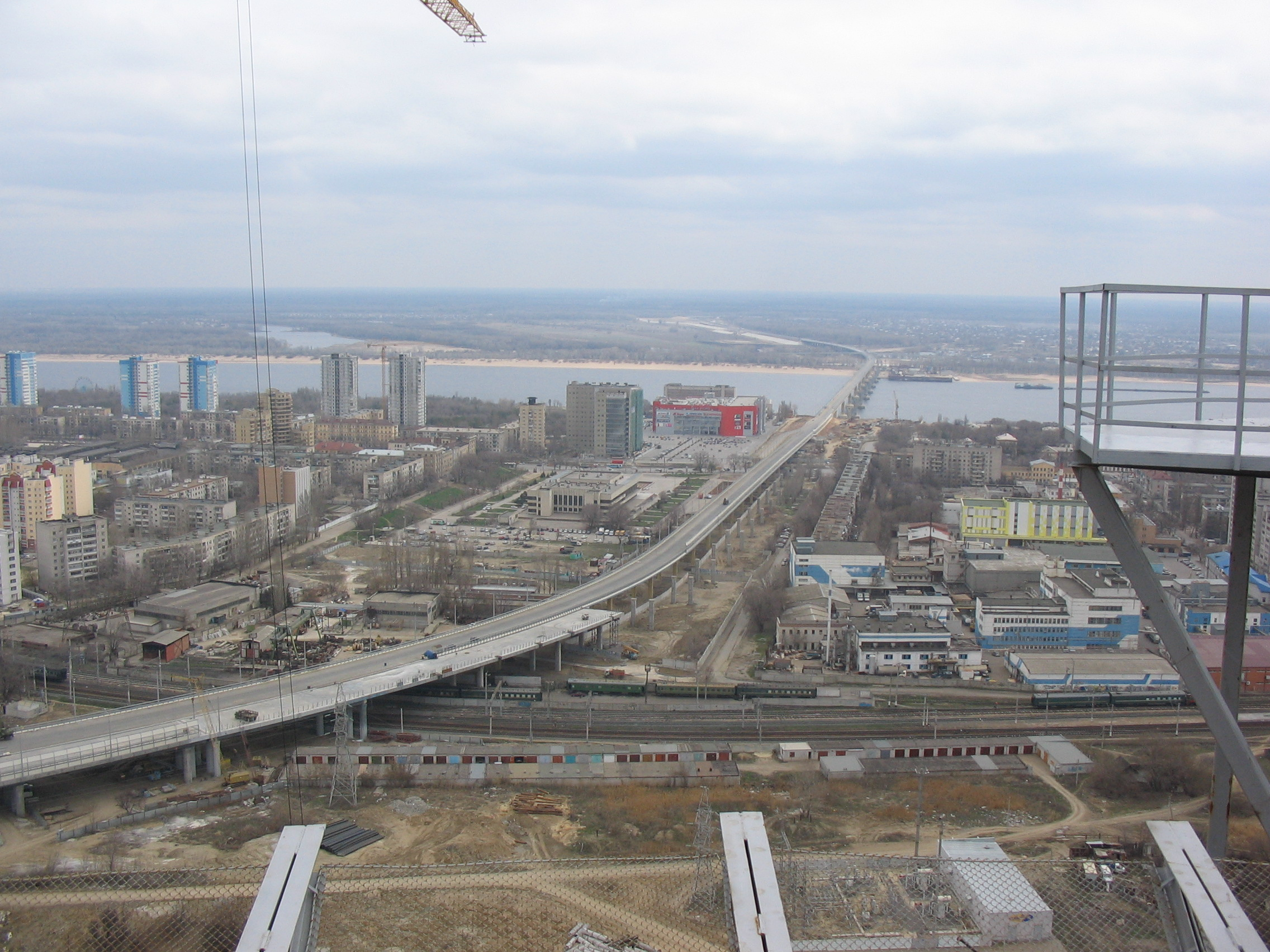 Строительство моста через Волгу. Вид с вертолетной площадки бизнес центра.